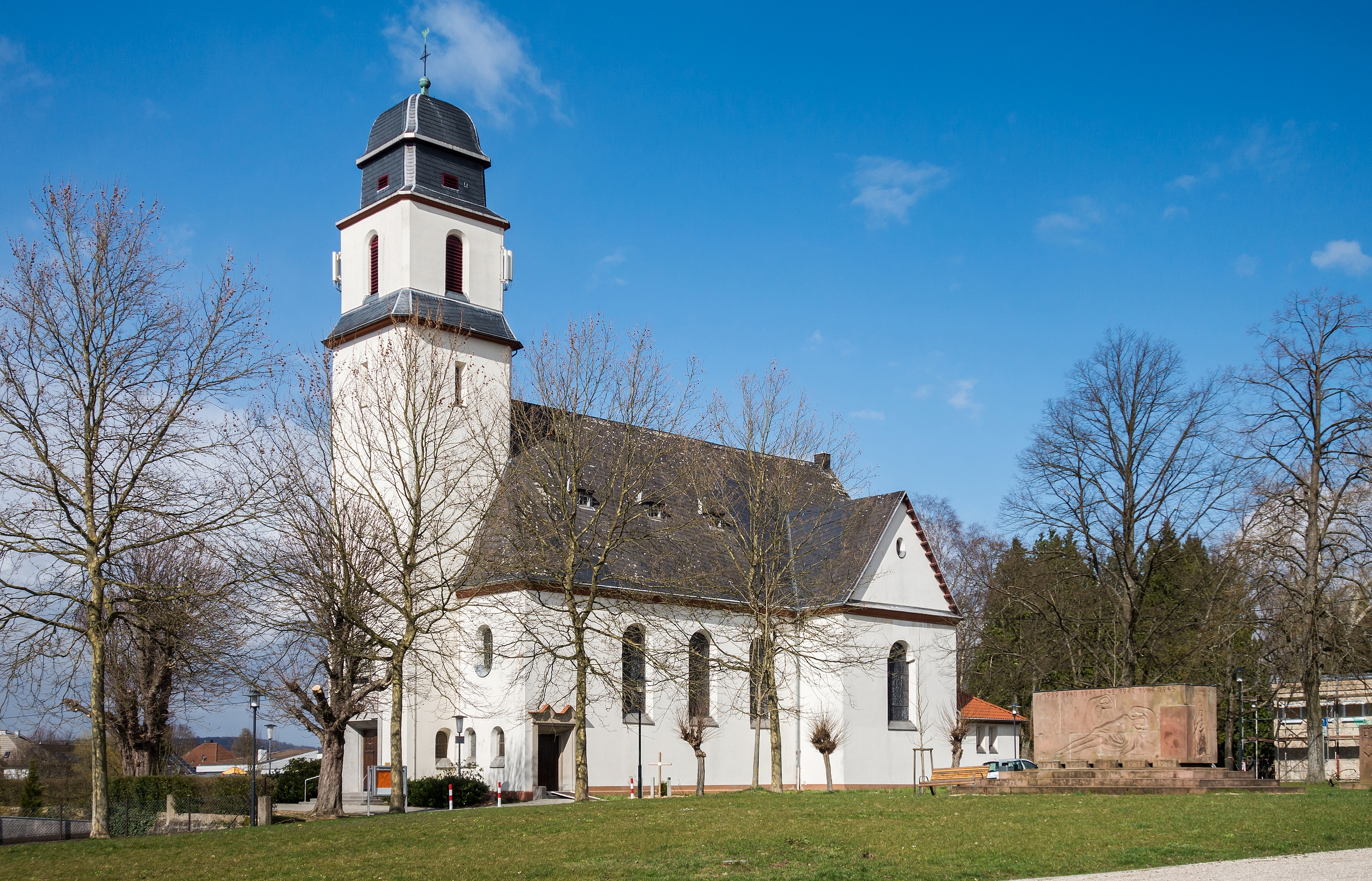 Die katholische Kirche St. Bartholomäus in Klarenthal, Saarbrücken